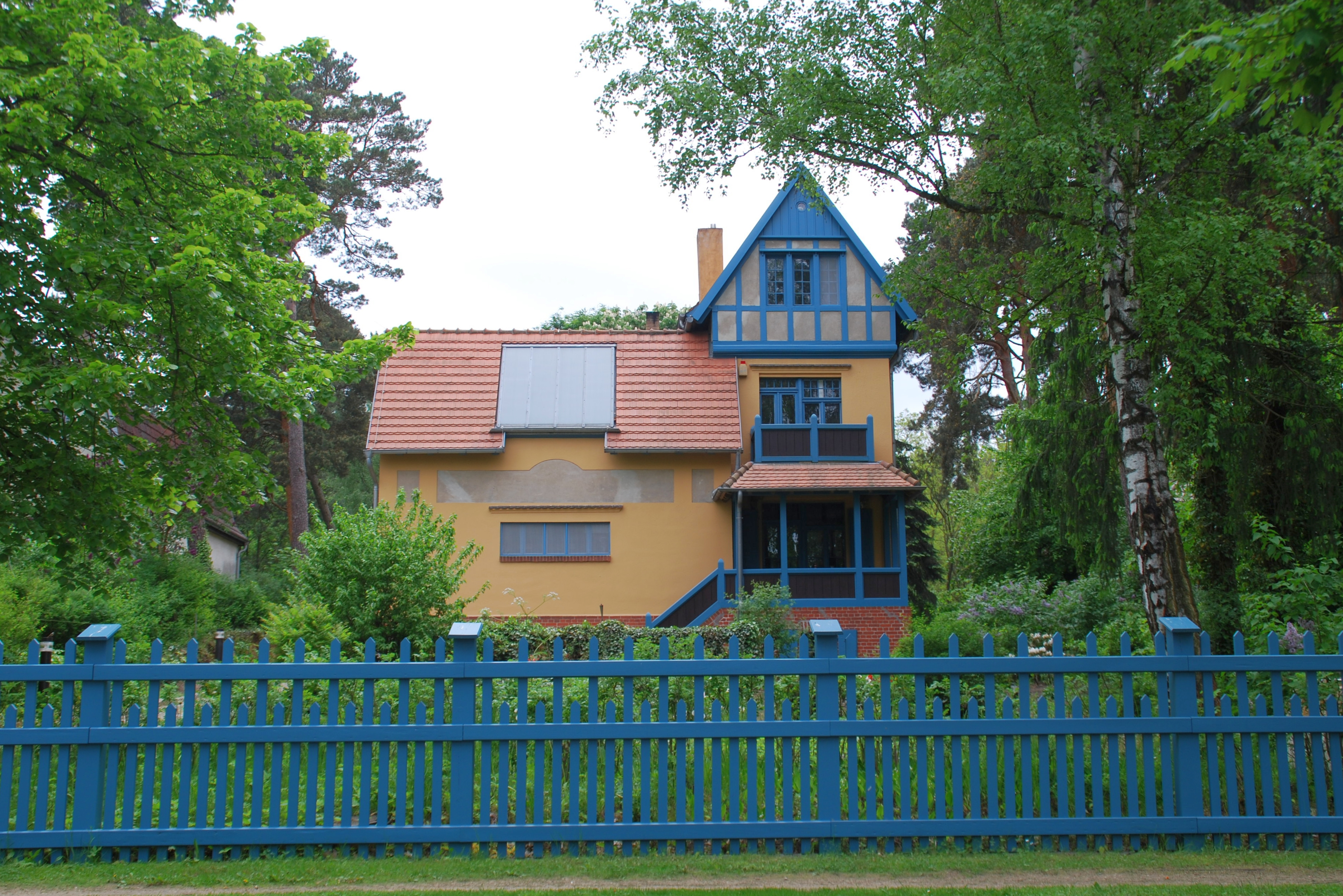 denkmalgeschütztes Wohn- und Atelierhaus mit Garten und Grundstückseinfriedung „Fidus-Haus“ in der Köpenicker Straße 46 in Woltersdorf. Das Haus wurde von 1908 bis 1910 im Heimatstil erbaut. Der Entwurf stammt von Fidus. Das Haus wurde von 1996 bis 1998 renoviert.